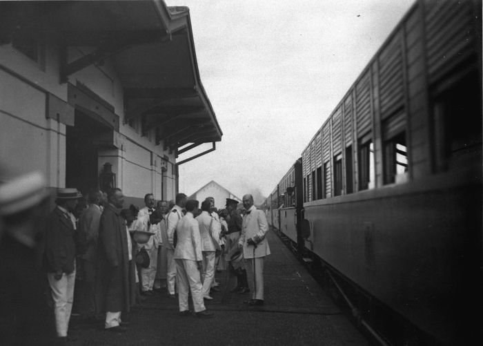 Foto. Gubernur-Jenderal mr. Dirk Fock berpamitan dengan Hammond di peron stasiun Pasir Boengoer (sekarang Pasirbungur) seusai melakukan kunjungan dua hari (27-28 Oktober 1922) di wilayah Pamanukan dan Ciasem, Jawa Barat